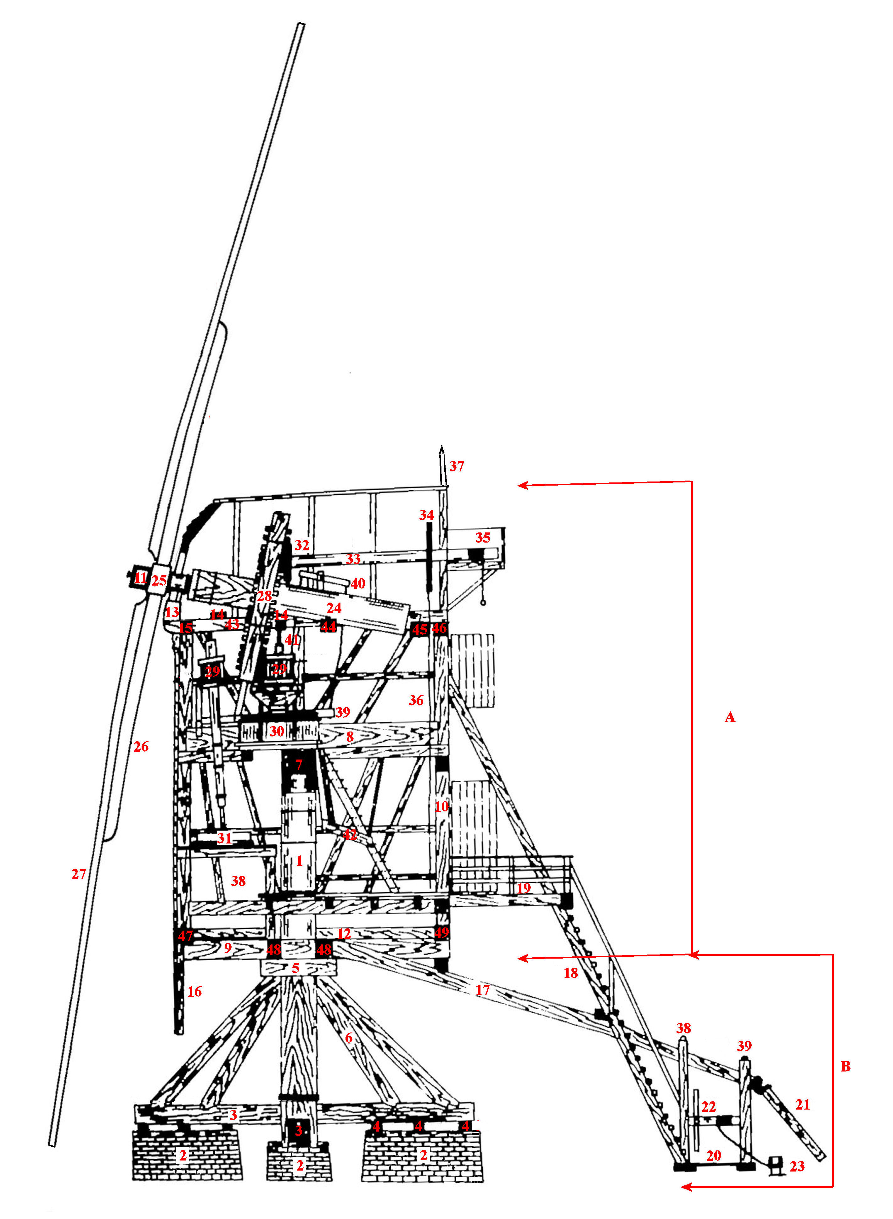 Standerdmolen. A=kast, B=voet. 1 standerd, 2 teerlingen, 3 kruisplaten, 4 zonneblokken, 5 zetel, 6 steekbanden, 7 steenbalk, 8 lange burriebalk, 10 hoekstijl, 11 roegat, 12 waterlijst, 13 windpeluw, 14 ijzerbalken, 15 tempelbalk, 16 borstnaald, 17 staartbalk, 18 trapboom, 19 galerij, 20 kruibank, 21 loopschoor, 22 kruihaspel, 23 kruipaal, 24 bovenas, 25 insteekkop, 26 borst, 27 oplanger, 28 bovenwiel, 29 steenrondsels, 30 maalkoppel, 31 maalkoppel, 32 varkenswiel, 33 luias, 34 gaffelwiel, 35 luikap, 36 luireep, 37 makelaar, 38 hel, 39 vangbalk, 40 binnenvangstok, 41 vangtouw, 42 maalbak, 43 daklijst, 44 koppelbalk, 45 penbalk, 46 achterbalk, 47 voorzomer, 48 korte burriebalken, 49 achterzomer.